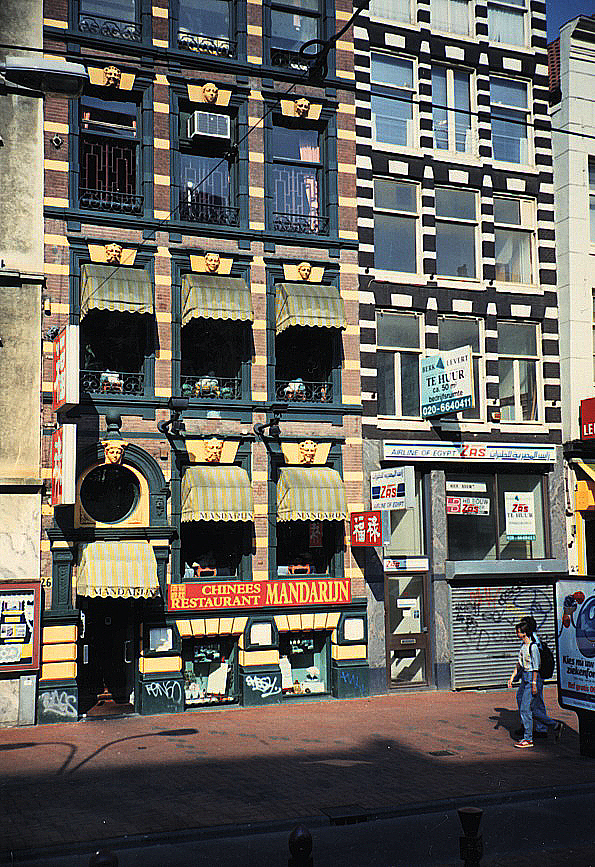 Rokin 26 (linkerpand) te Amsterdam, ontwerp IJme/Yme Gerardus Bijvoets ca. 1883, gemeentelijk monument